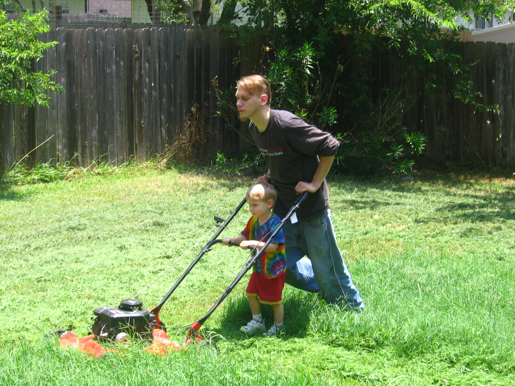 Jonge dy't it gers meant.